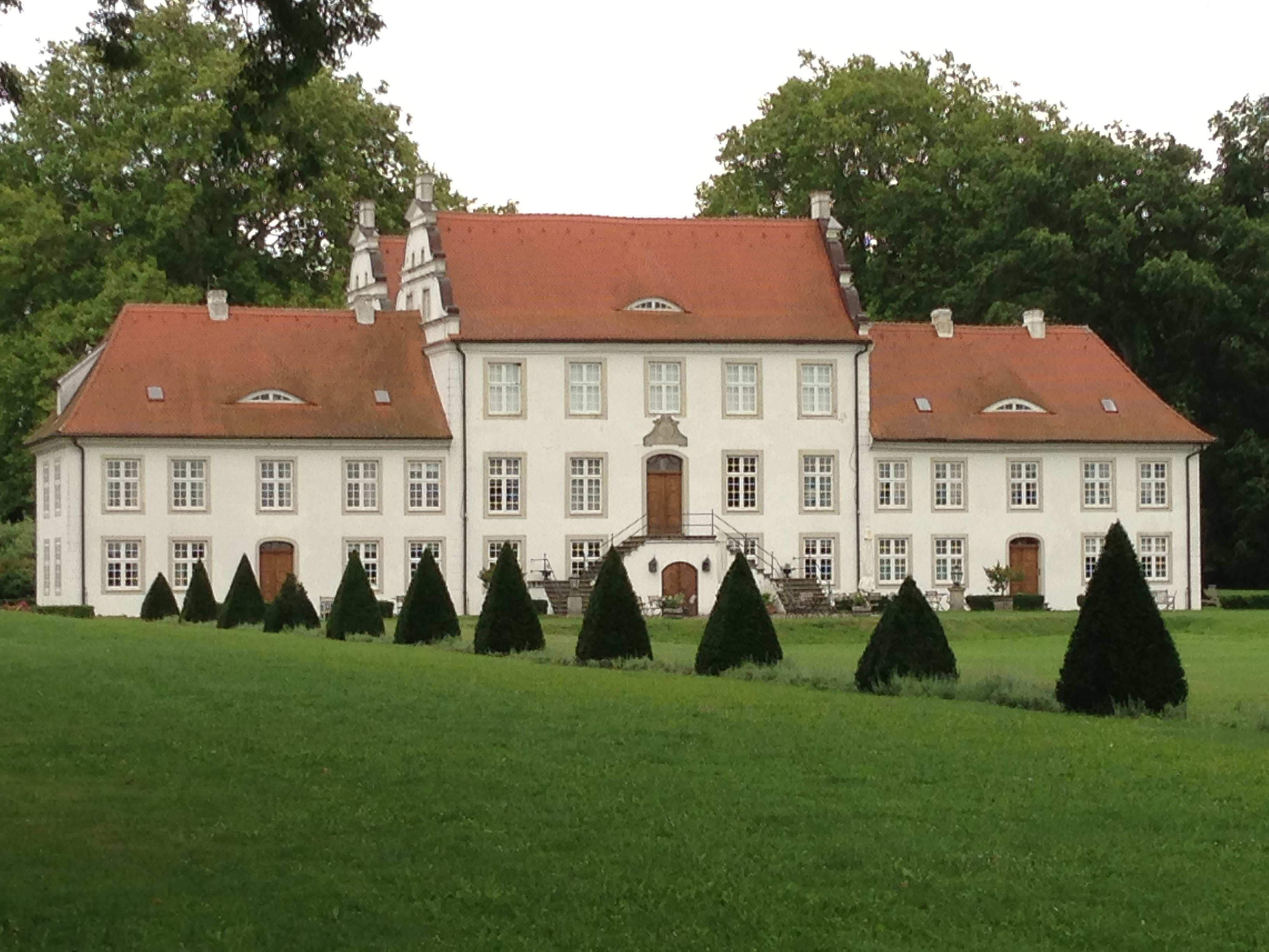 Deitsch: Das Herrenhaus auf Gut Boldevitz, Rügen